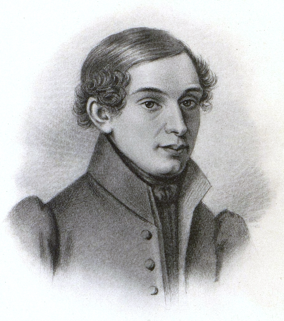 Глебов, Михаил Николаевич